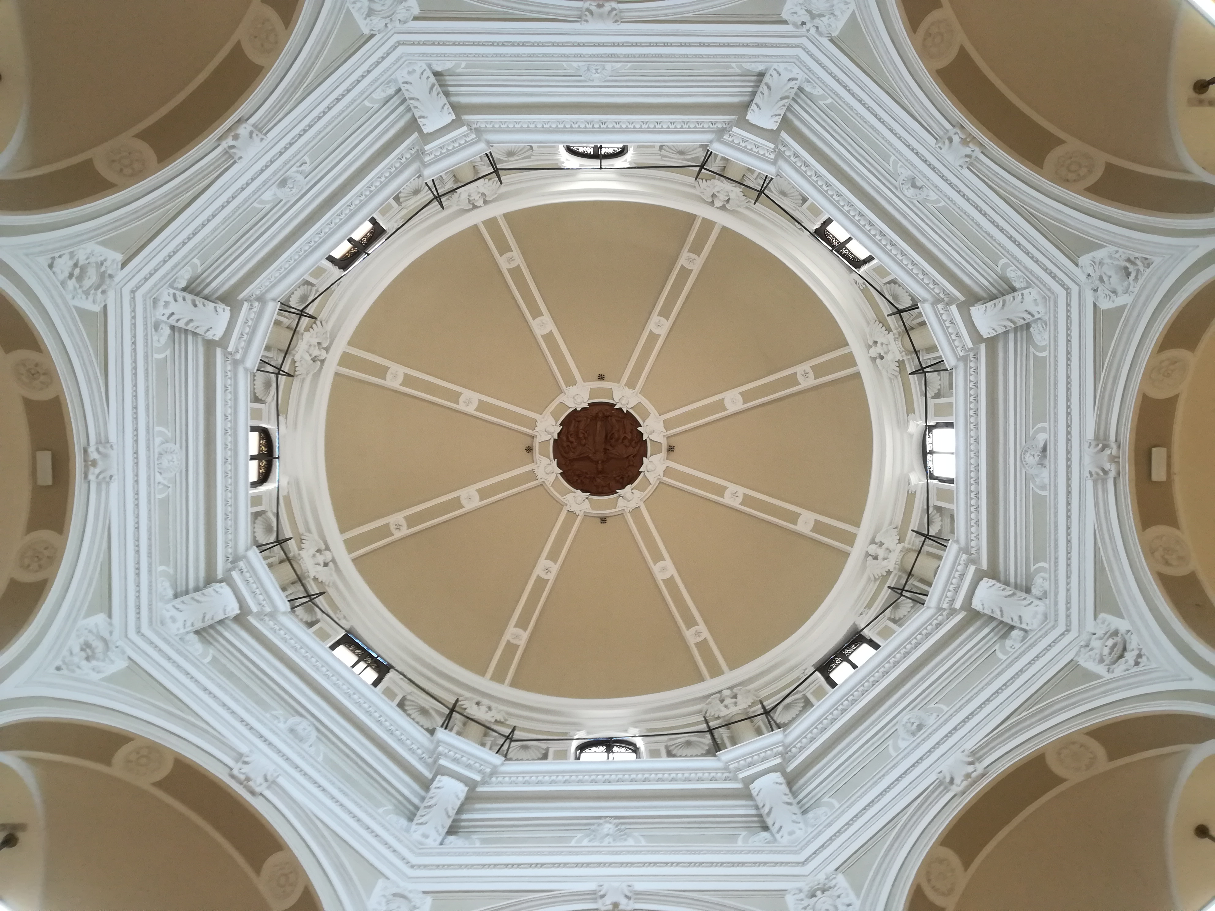 Biblioteca Pública de València